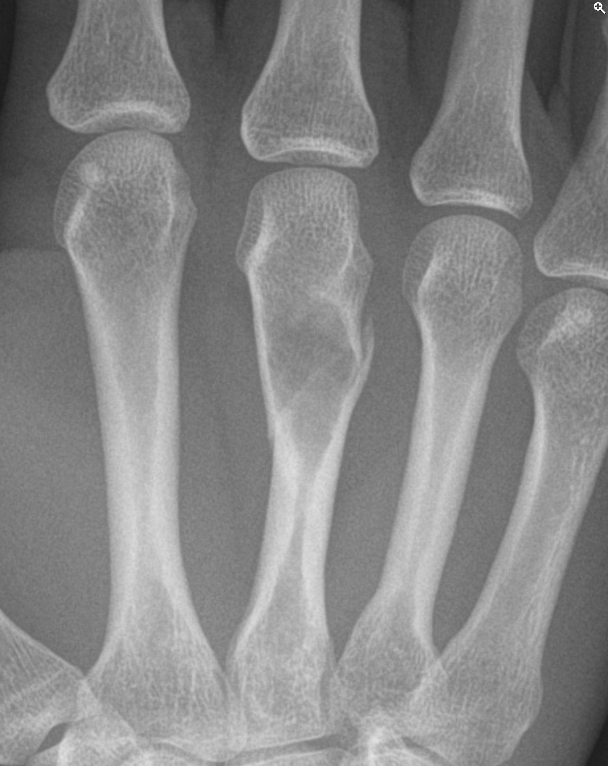 Enchondrom des 3. Mittelhandknochens mit pathologischer Fraktur. Durch die erhebliche Ausdünnung der Kortikalis ist der Knochen an der Stelle erheblich weniger belastbar und es kam in diesem Fall schon beim ruckartigen Anheben eines Gegenstandes zur Fraktur.